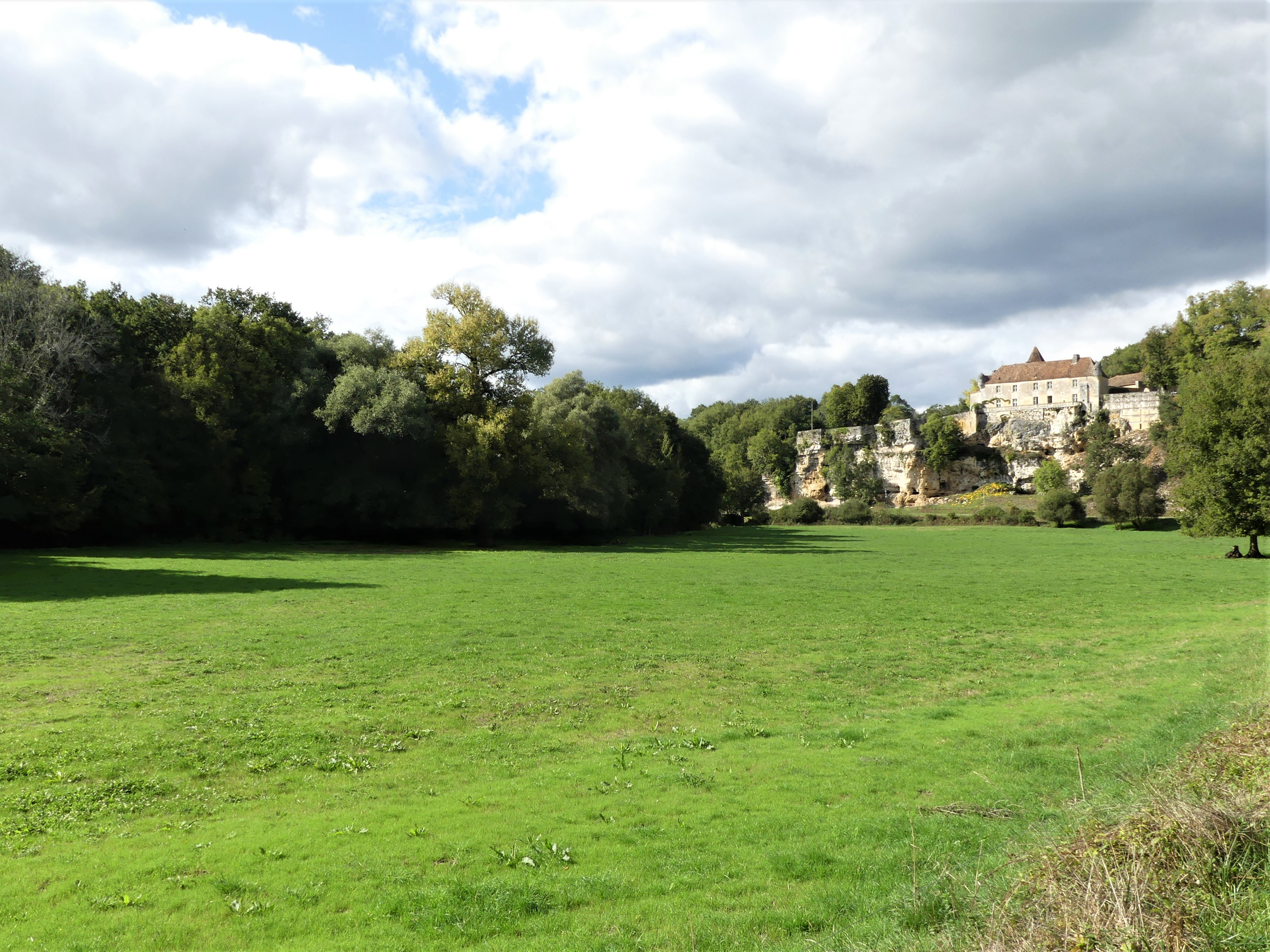 La vallée de la Nizonne en amont du château d'Aucors, commune déléguée de Beaussac, commune nouvelle de Mareuil en Périgord, Dordogne, France. Vue prise en direction de l'aval.